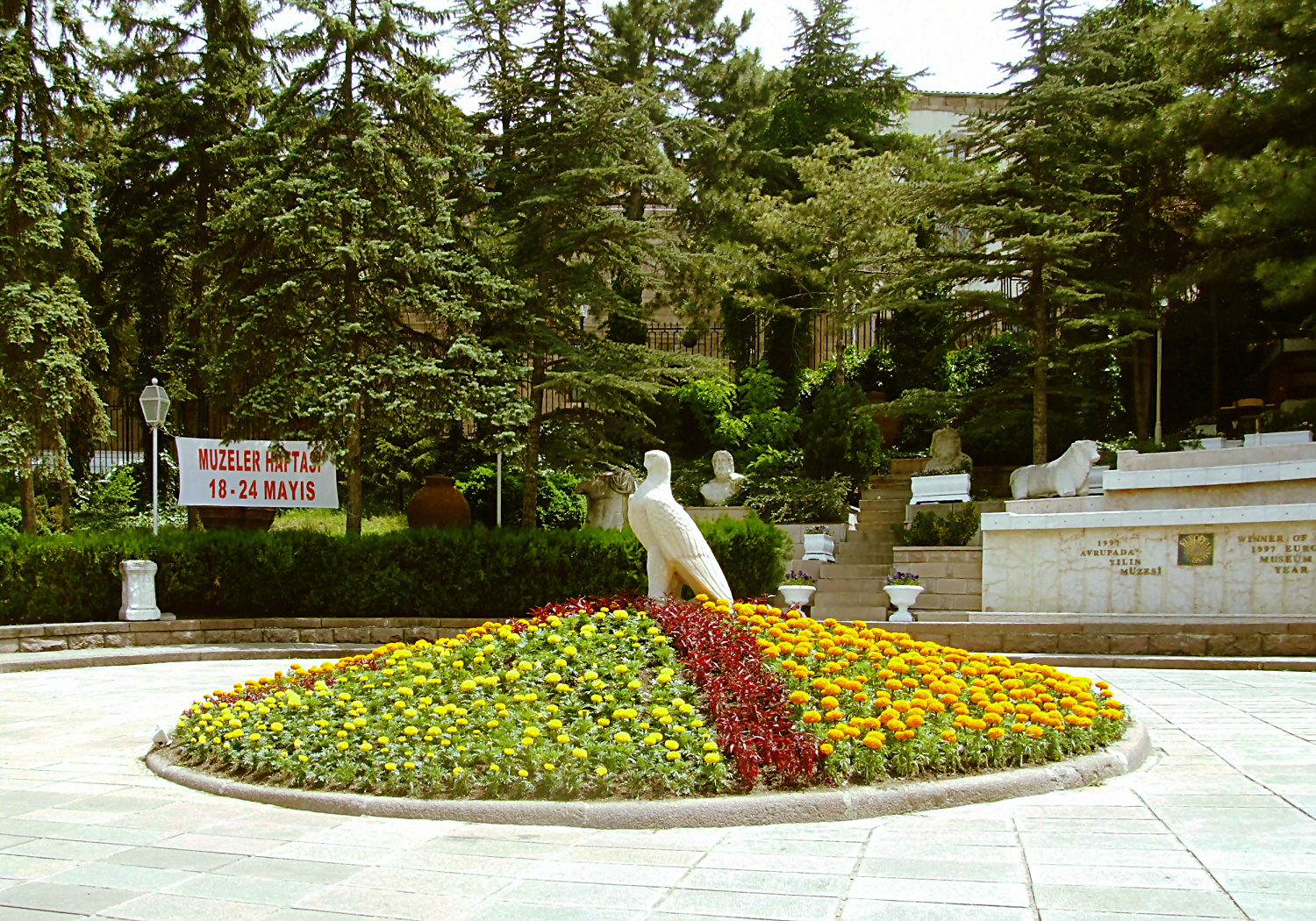 Muzeum Cywilizacji Anatolijskich w Ankarze (dziedziniec); Museum of Anatolian Civilizations in Ankara (yard)